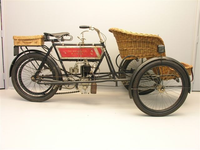 Waddington forecar motorcycle with Fafnir 500 cc ieo engine from 1905.